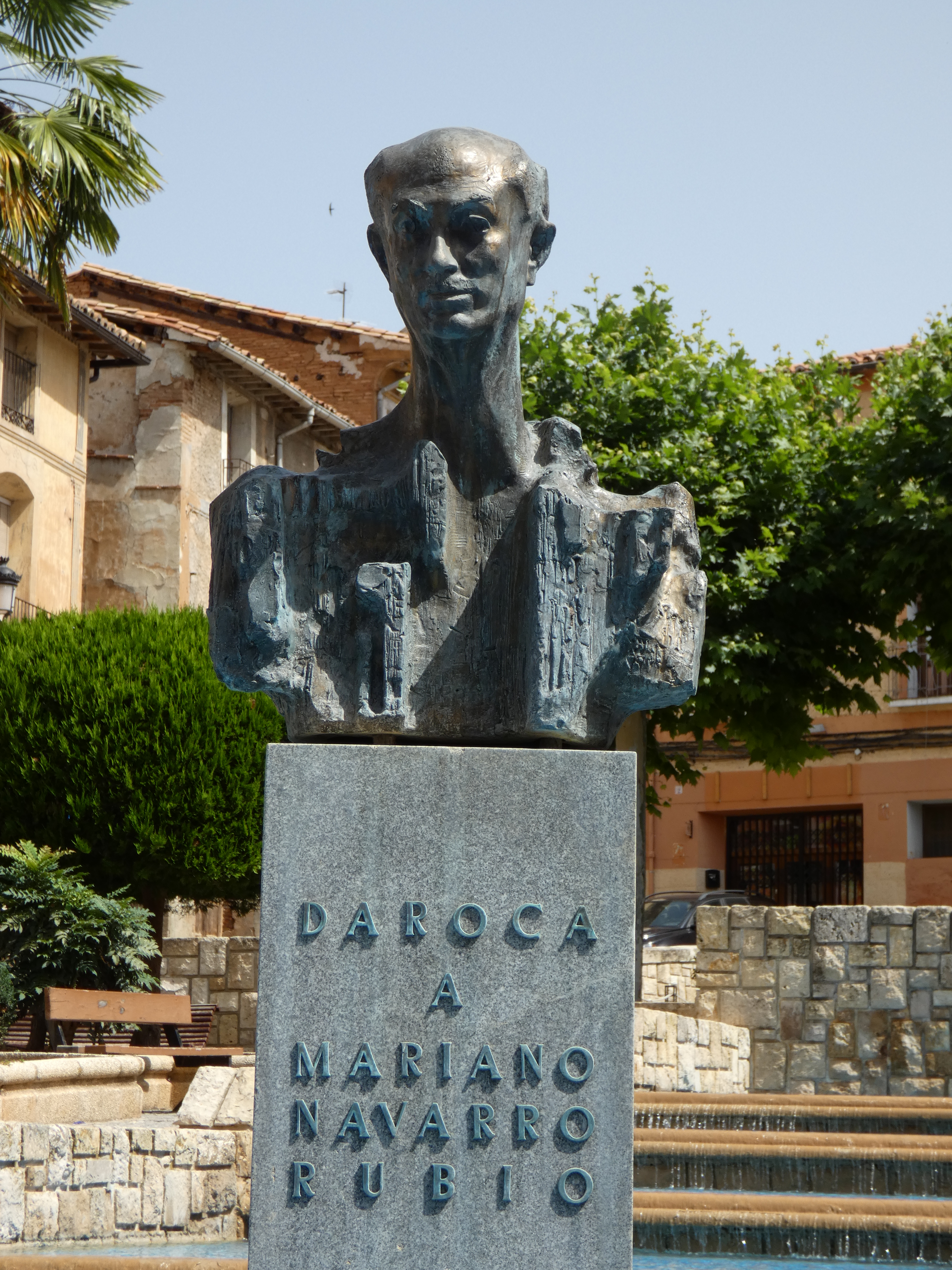 Daroca a Mariano Navarro Rubio